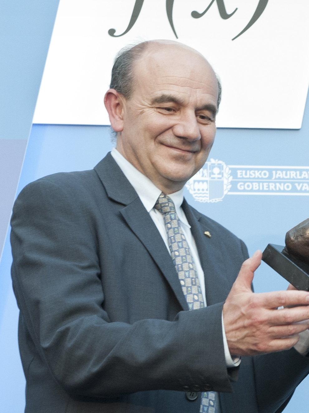 .El matemático Luis Vega ha recibido esta tarde el Premio Euskadi de Investigación 2012. El Lehendakari ha destacado el “afán divulgador y pedagógico” del matemático y ha subrayado su compromiso con Euskadi dadas sus responsabilidades en la Universidad del País Vasco y en Basque Center of Applied Mathematics (BCAM ). Iñigo Urkullu ha asegurado que Luis Vega ha contribuido a la apertura de Euskadi al exterior con sus estancias y colaboraciones con las Universidades más prestigiosas de Estados Unidos, Francia o Italia. Así, con este premio el ejecutivo vasco quiere agradecer y poner en valor el trabajo realizado por Luis Vega porque, según el propio Lehendakari, ha añadido a la investigación un “claro compromiso con la gestión pública, con la apertura al exterior de nuestro País y con la divulgación”, ha concluido. Luis Vega González (Madrid, 1960) se licenció en matemáticas en la Universidad Complutense en 1982. Se doctoró en 1988 por la Autónoma de Madrid (UAM). Tras una estancia de dos años en la Universidad de Chicago, se incorporó a la UAM. En 1993 se trasladó a la Universidad del País Vasco, de la que es catedrático de Análisis Matemático desde 1995. En la actualidad el profesor Vega es director del centro de investigación de matemáticas BCAM (Basque Center for Applied Mathematics), y un experto mundialmente conocido por sus trabajos sobre ecuaciones en derivadas parciales y análisis de Fourier